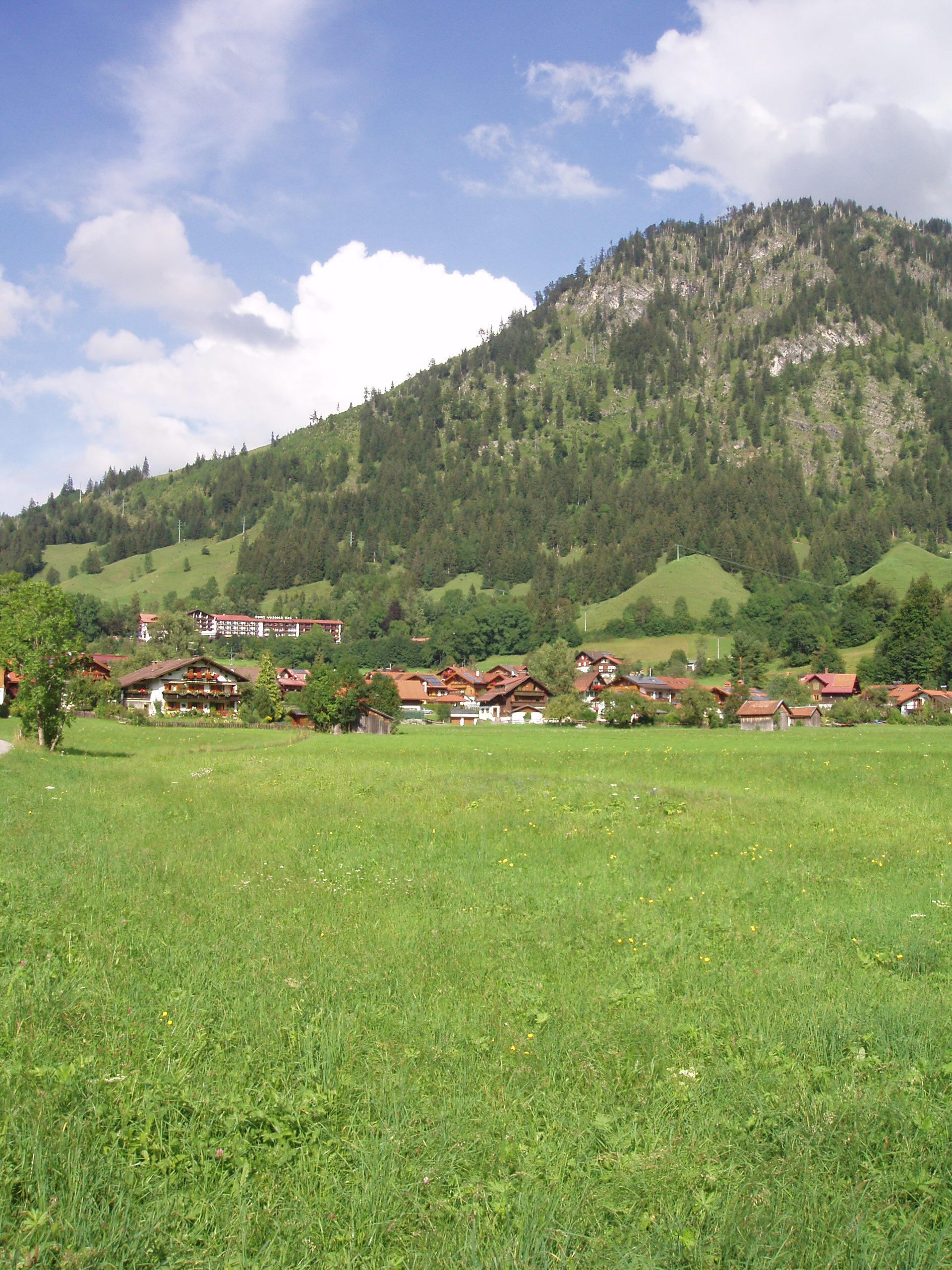 Blick auf Bad Oberdorf aus Richtung der Oberen Mühle